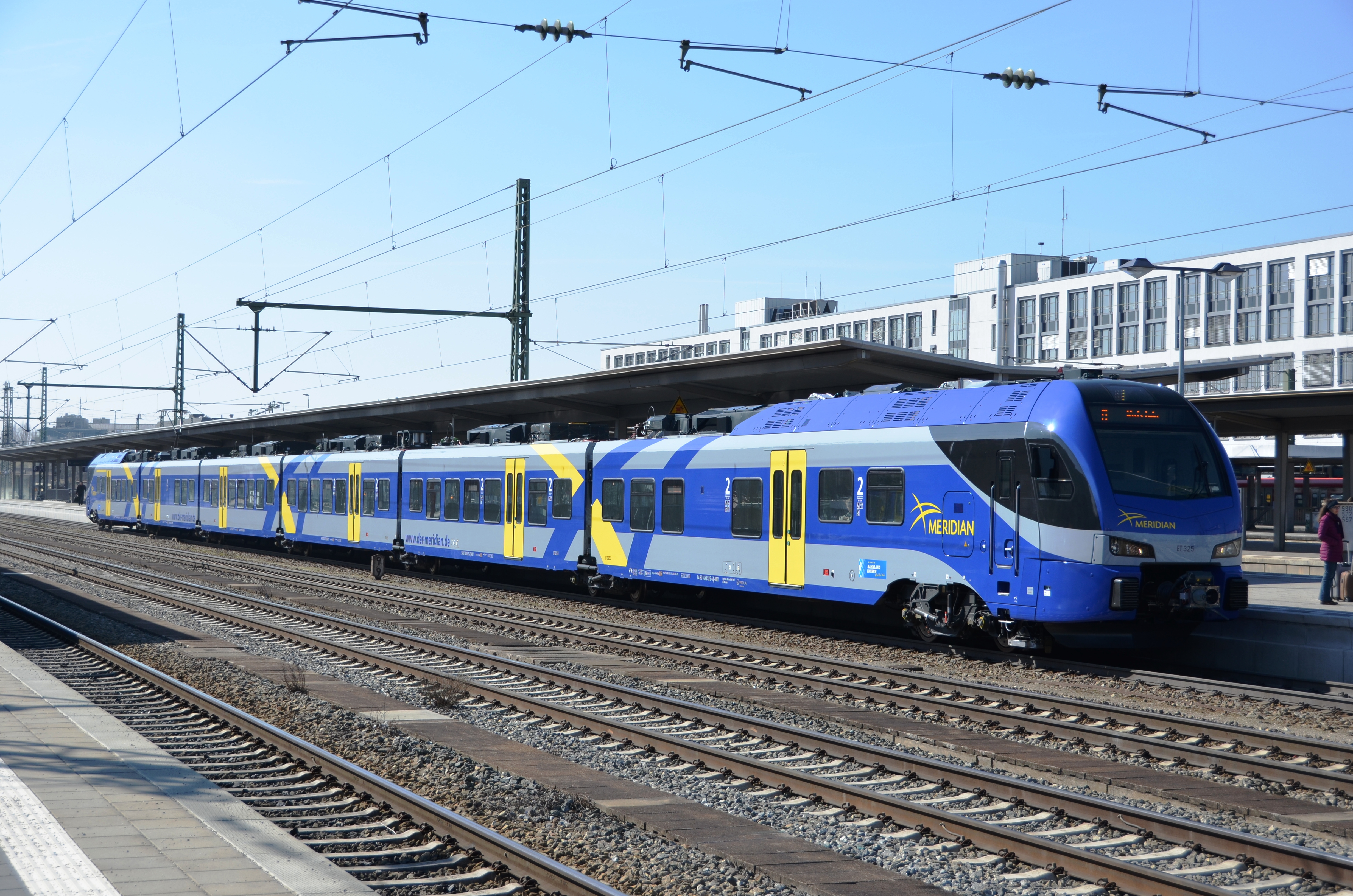 ET 325 Meridian Munich Hbf - Salzburg @ Munich Ost 09.03.14